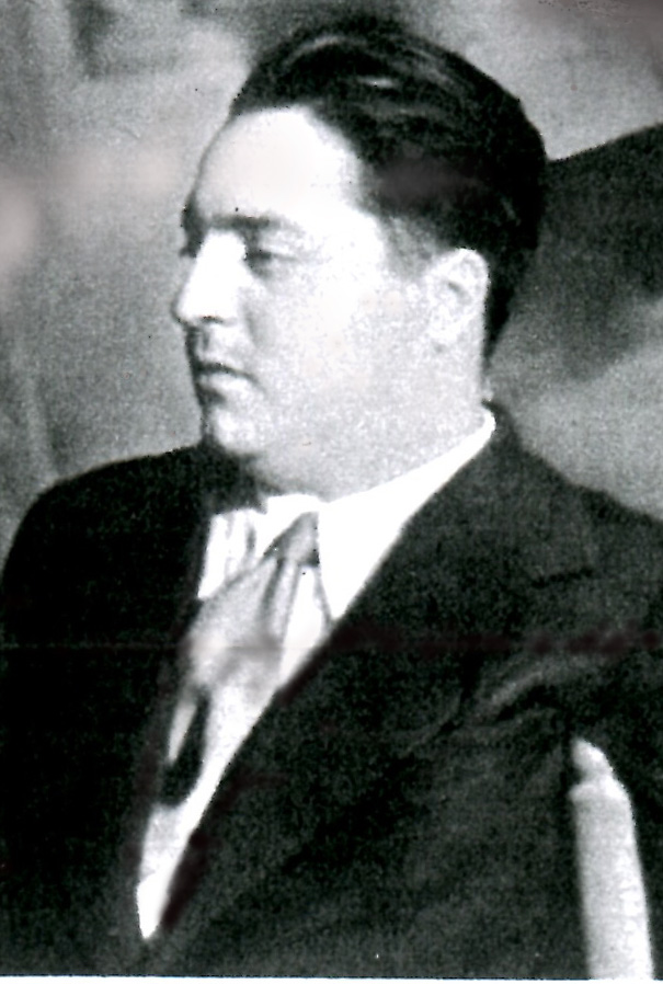 Un'immagine del regista Raffaello Matarazzo, anno 1936